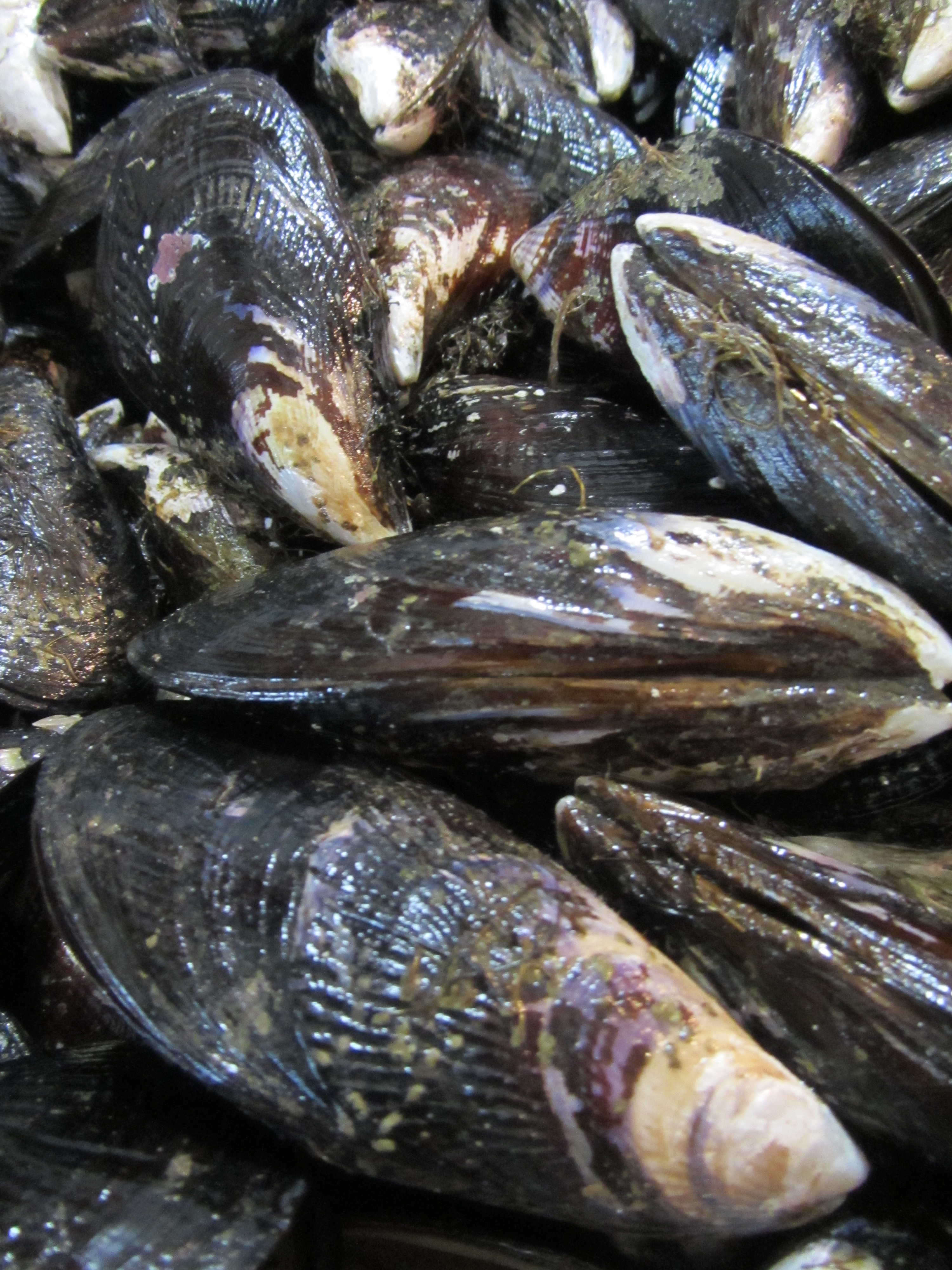 Cholgas (Aulacomya atra Aulacomya atra en pescadería de Puerto Varas, Chile